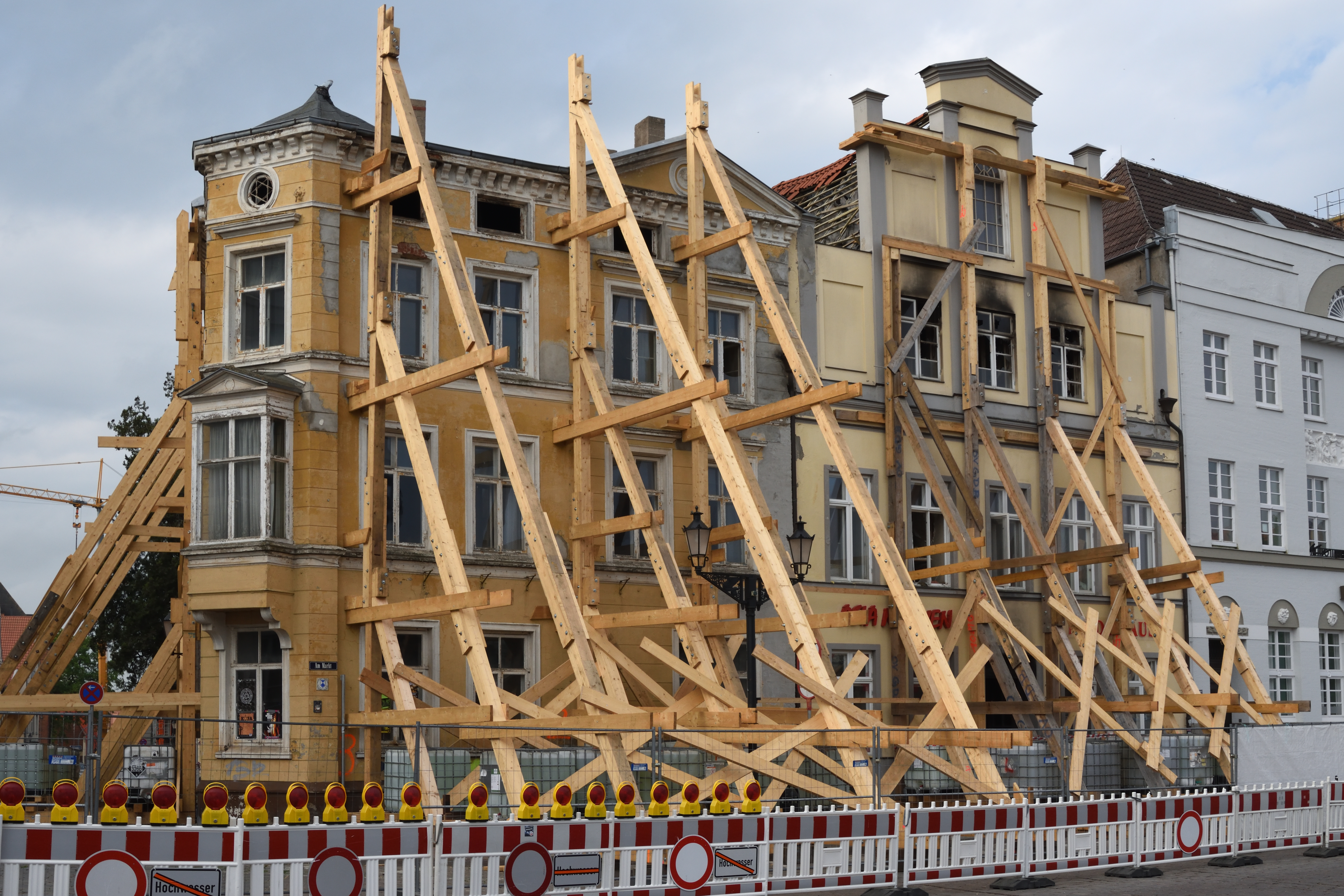 Am Abend des 27. April 2018 brach am Markt in Wismar ein Hausbrand aus, der zwei historische Häuser fast vollständig zerstörte.